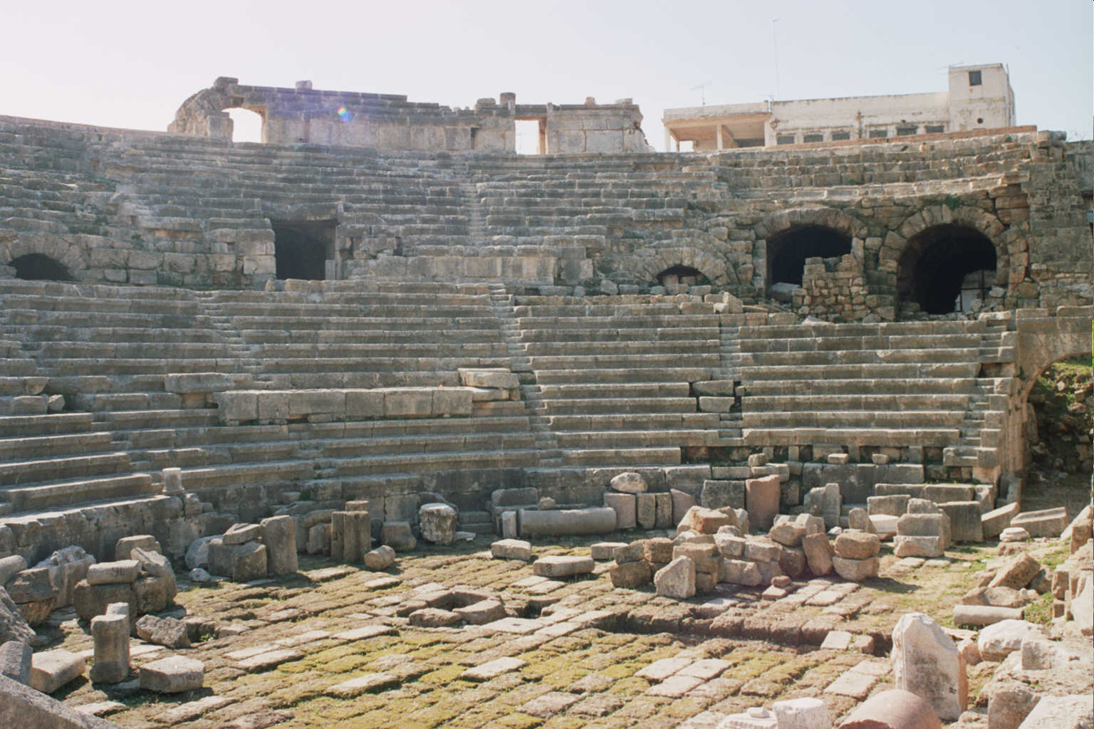 Loris - Teatro di Jableh - 2005